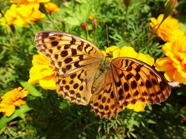 オオウラギンスジヒョウモン♀、東京にて撮影